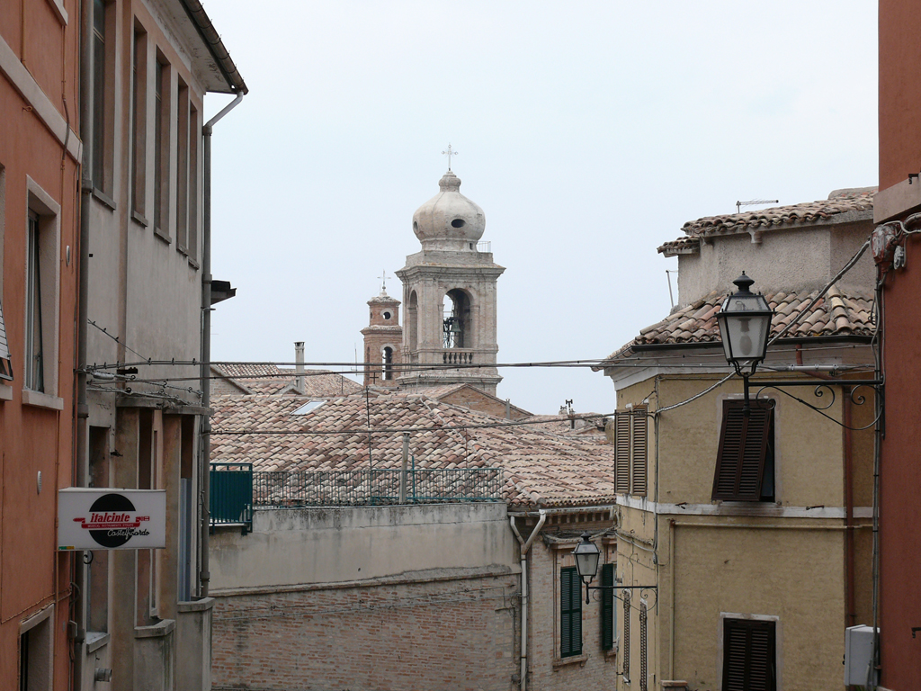 Castelfidardo, view